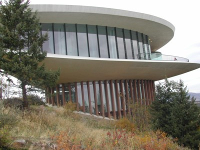 Filmkulisse Sleeper House. Sleeper House.